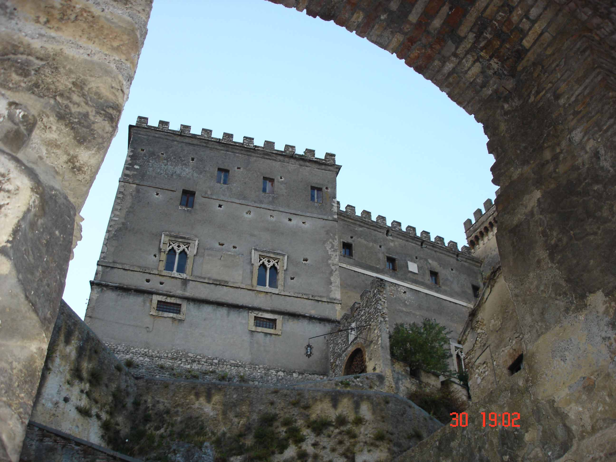 Fotografia personale Castello Massimo di Arsoli ( - Roma) Agosto 2006 scattata da in Via Della Chiesa